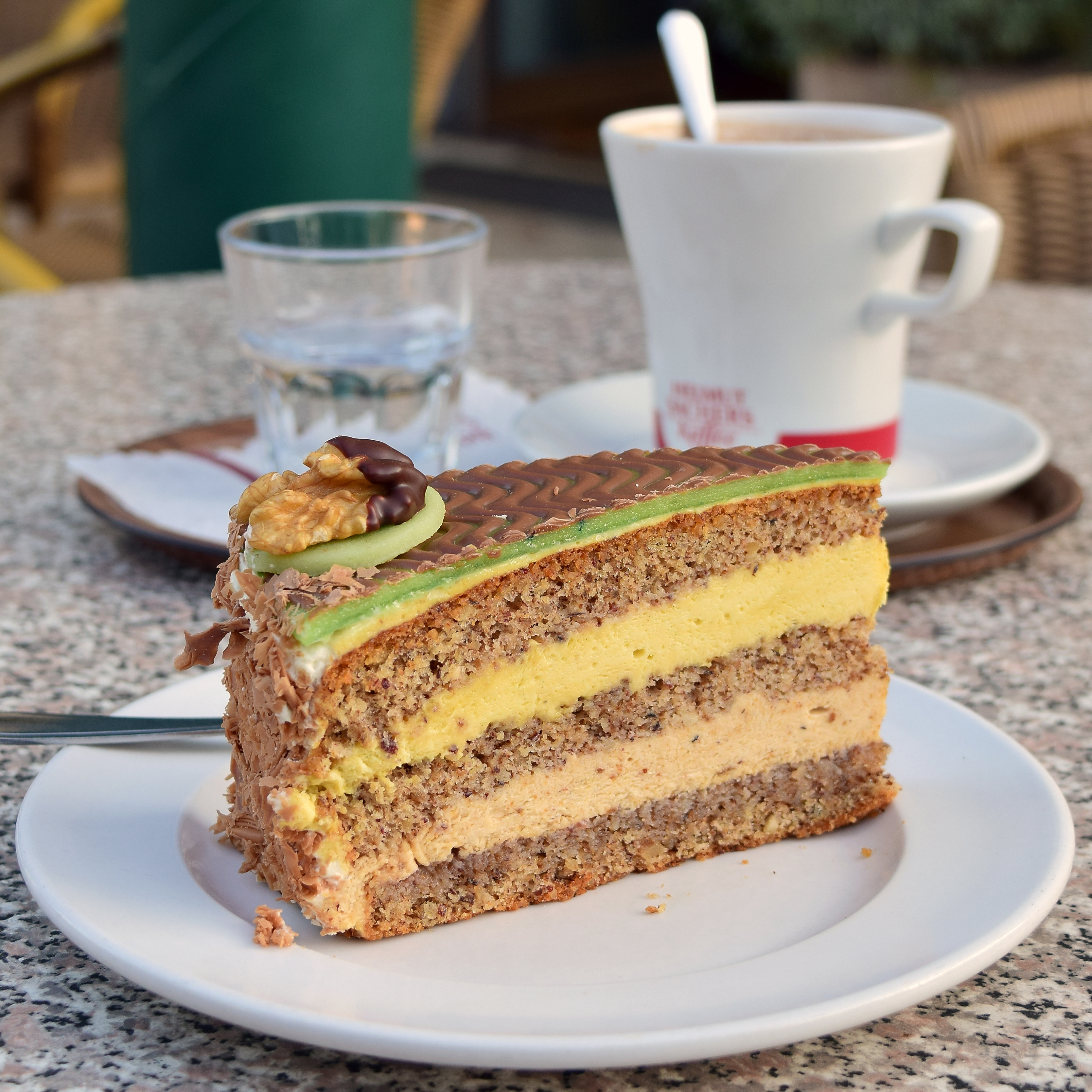 Die Ghega-Torte ist im Semmeringgebiet erhältlich und wurde nach dem Erbauer der Semmeringbahn, Carl von Ghega, benannt. Es handelt sich um eine Nusstorte mit Marzipan, aufgenommen in der Konditorei Alber in Payerbach.